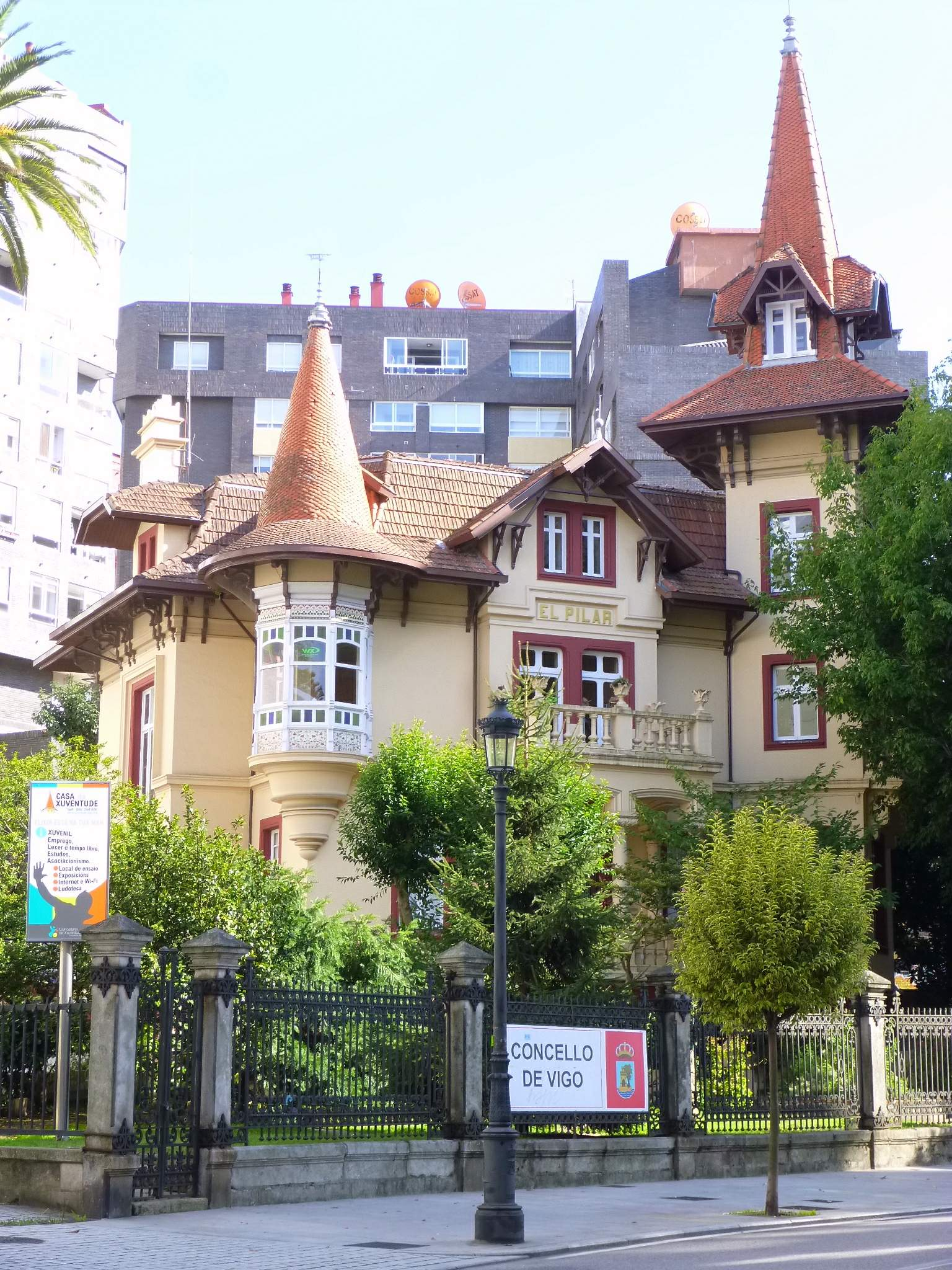 Vigo - Chalet El Pilar (Casa da Xuventude)